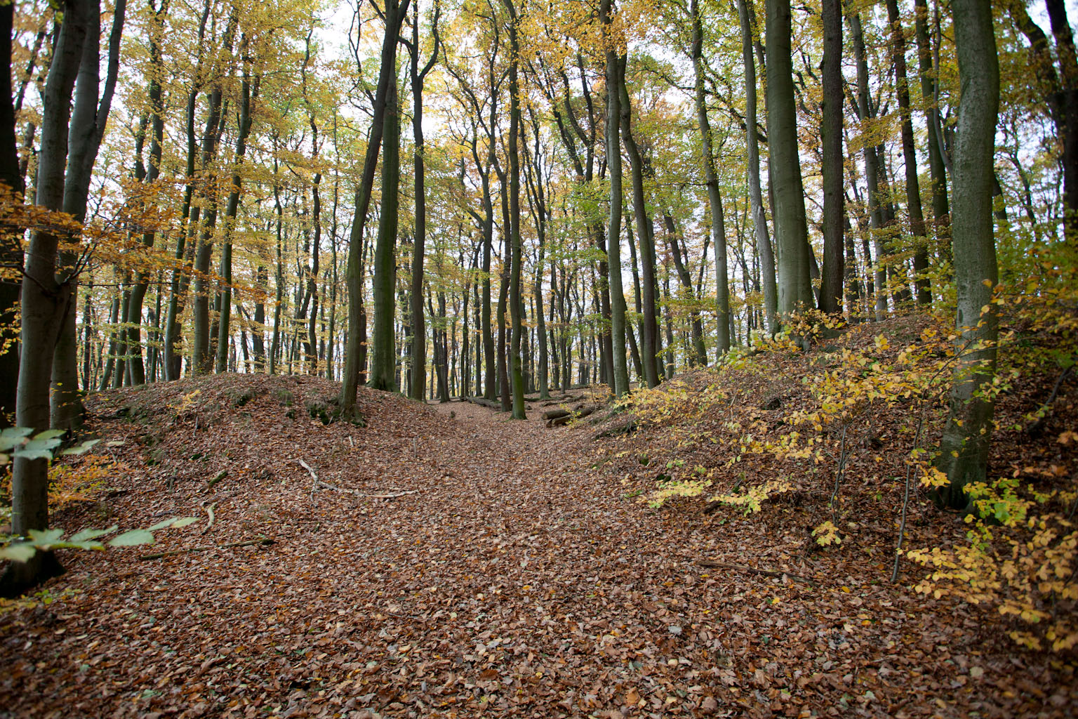 Wallreste der Uffoburg